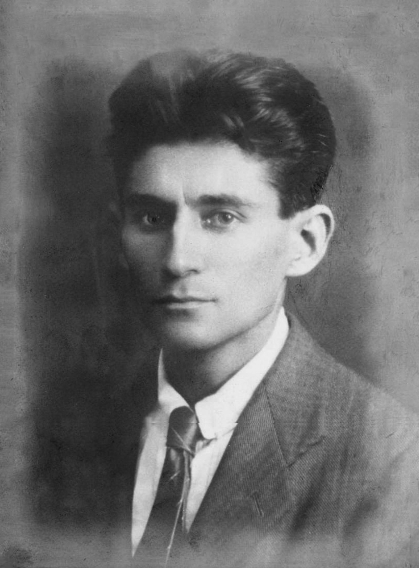 Franz Kafka, bust length portrait.